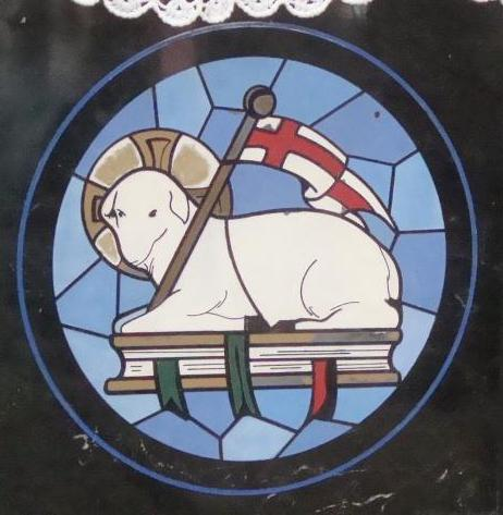 Parroquia del Senor del Santuario, Reforma, Chiapas, Mexico